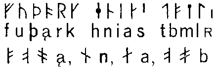 шведские руны. сайт Арильда Хауге